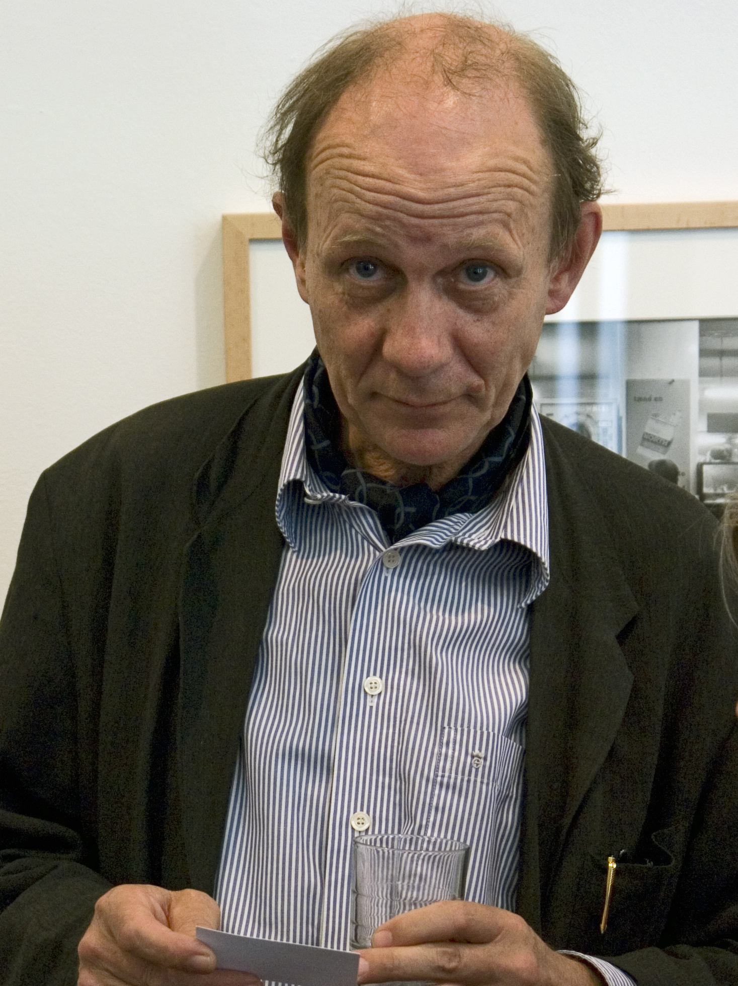 Krass Clement im Forum für Fotografie, Köln